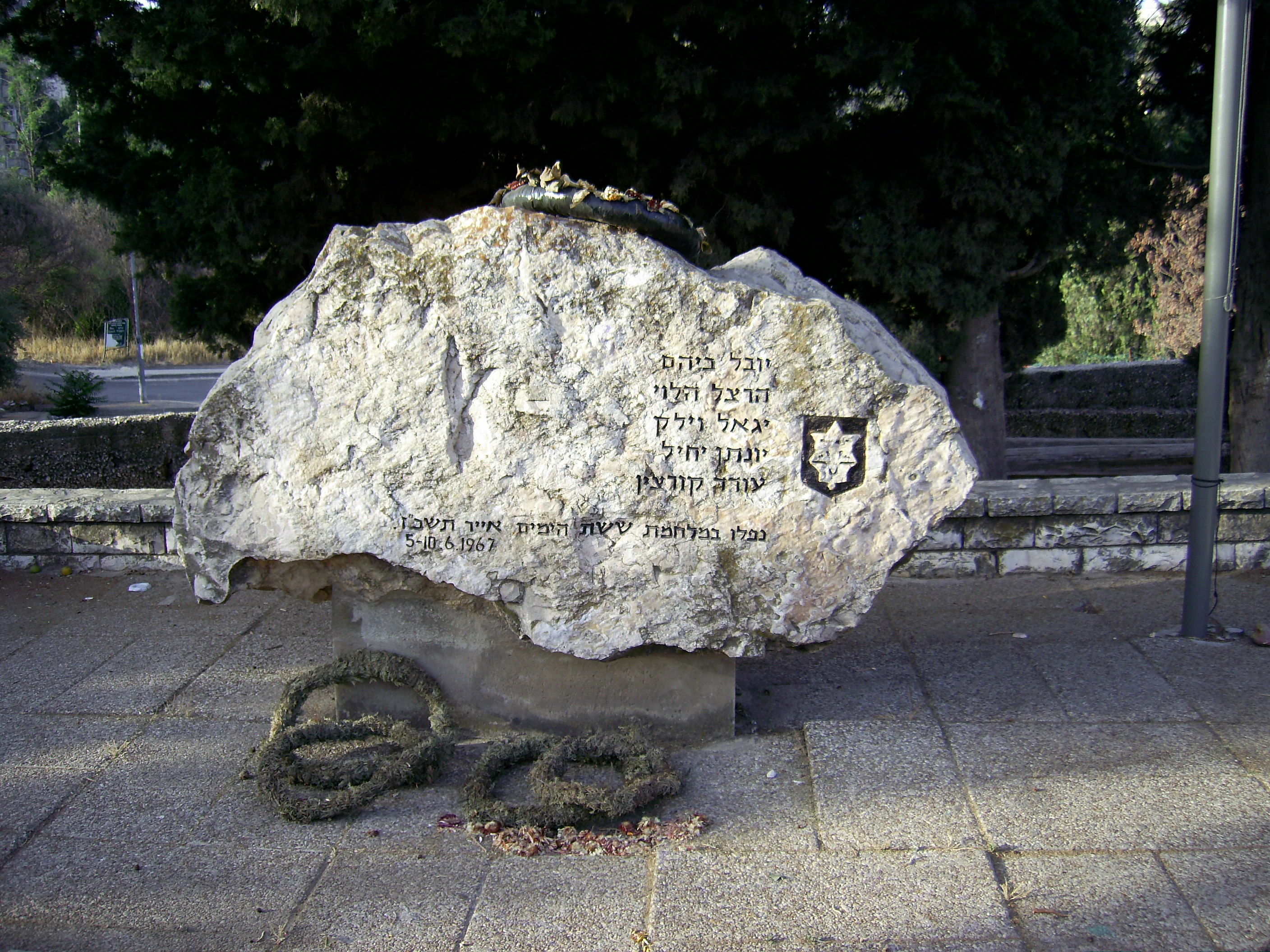 Scouts Memorial in Jerusalem Jerusalem